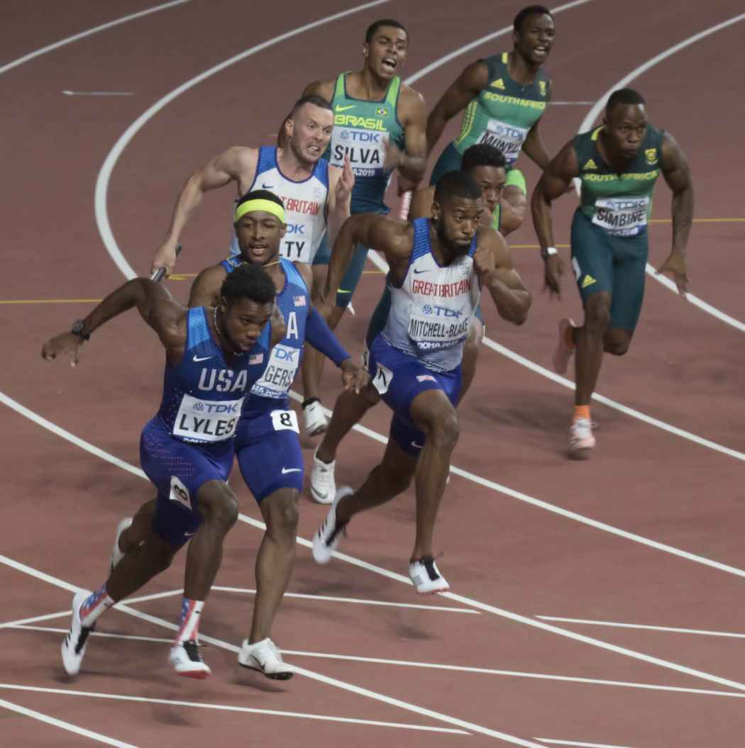 DOH80515 4x100m men final lyles